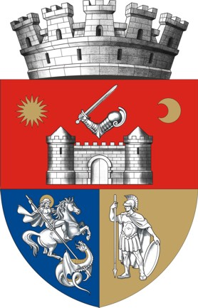 Stema municipiului Caransebeş Descrierea stemei Stema municipiului Caransebeş, se compune dintr-un scut curbat la bază, tăiat-despicat în talpă. Primul cartier, pe roşu, conţine o cetate medievală de argint, cu două turnuri ascuţite şi poartă centrală închisă, însoţită de un "soare-răsare" şi o lună, ambele de aur. Deasupra cetăţii planează un braţ drept înzăuat cu spadă, tot de argint. Cartierul al doilea, pe albastru, îl prezintă pe Sfântul Gheorghe ecvestru, străpungând cu suliţa anticristul reprezentat printr-o amfipteră, totul de argint. Aureola Sfântului Gheorghe şi solzii animalului sunt executate din aur. Al treilea cartier, pe aur, reprezintă un soldat roman cu scutul lăsat, sprijinindu-se într-o suliţă cu vârful în jos, totul de culoare albă, ce sugerează marmura. Scutul este timbrat de o coroană murală din argint cu cinci turnuri crenelate, simbolizând statutul de municipiu al localităţii. Semnificaţia elementelor însumate Armele primului cartier fac trimitere la secolul al XIII-lea, perioadă în care Caransebeşul este atestat documentar şi în care oraşul fortificat cunoaşte o puternică dezvoltare. Urbea este cunoscută ca un bastion de apărare a creştinătăţii împotriva invaziei păgâne, iar cei doi aştri semnifică libertatea, belşugul, veşnicia, dar şi înnoirea Caransebeşului. Cartierul albastru, care semnifică credinţă, speranţă şi sinceritate, este rezervat credinţei creştine a locuitorilor. Sfântul militar, patron spiritual al Episcopiei de Caransebeş, reprezintă victoria Binelui împotriva Răului. Soldatul roman din ultimul cartier este întruchiparea lui Virtus, zeu roman al curajului, şi face trimitere la virtuţile tradiţionale: cinstea, curajul, sinceritatea, modestia, însuşiri morale tipice locuitorilor acestei aşezări.